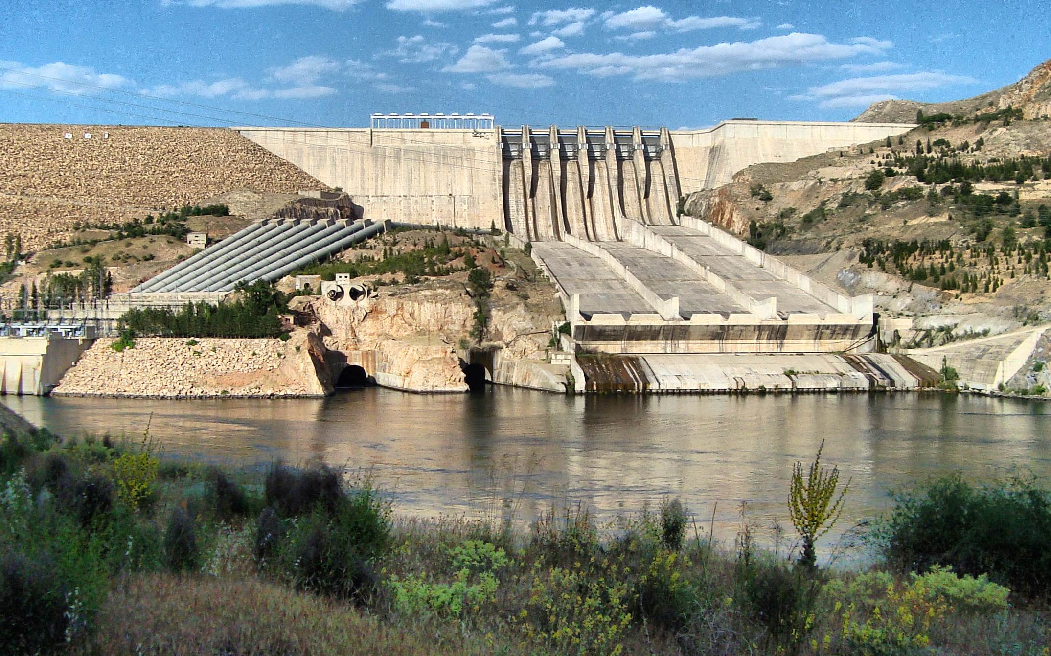 Keban barajı-Keban-Elazığ